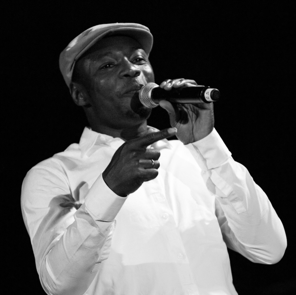 Roy Hargrove's RH Factor invite MC Solaar, Festival Jazz des Cinq Continents, Marseille Juillet 2009